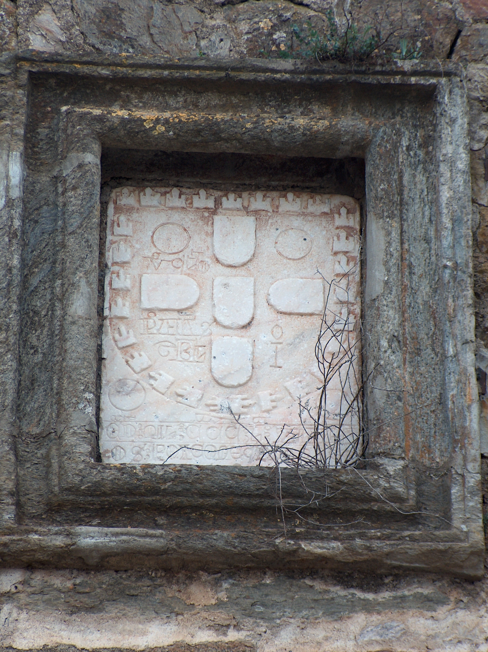 Prédio militar n.º 1, constituído por restos de muralha e torre de menagem do Castelo de Redondo